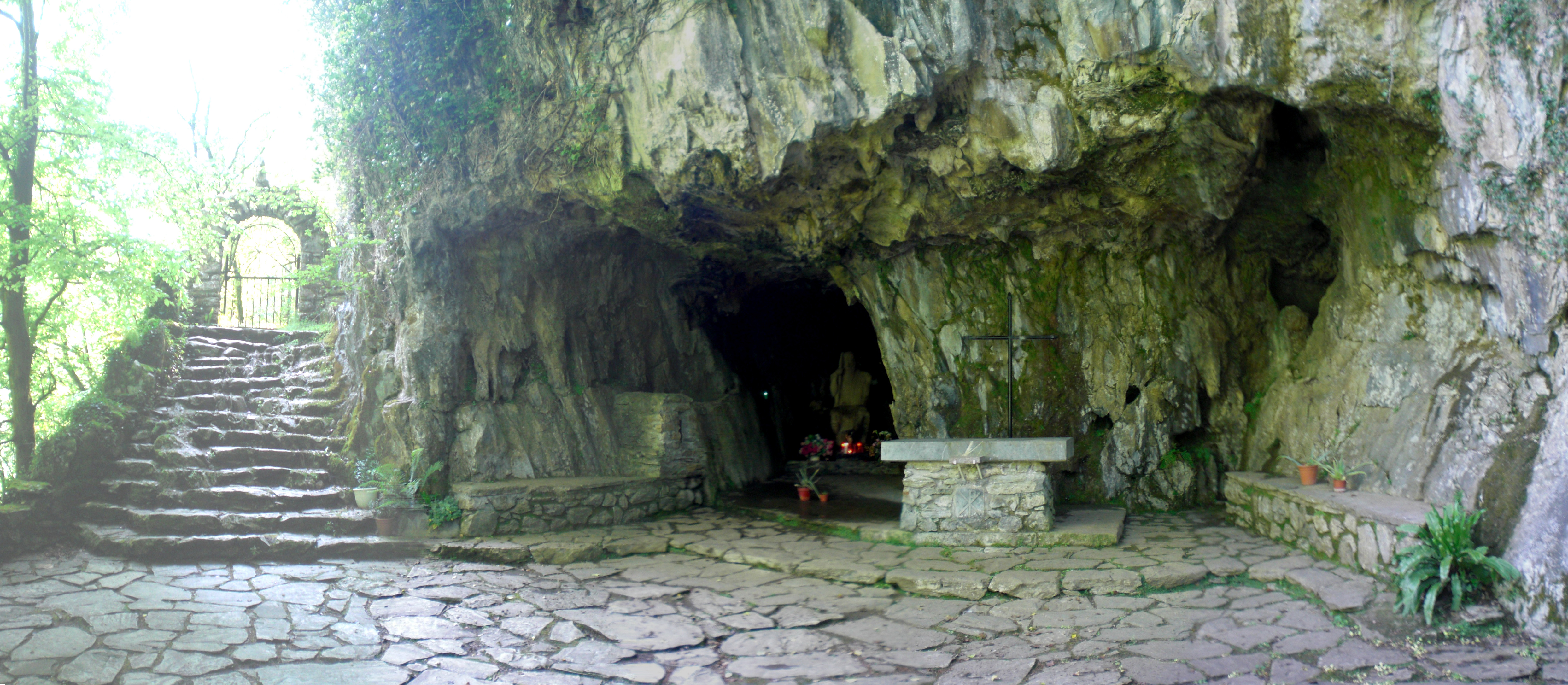 Igantziko San Juan Xar kobazuloa.